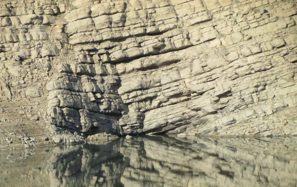 Ujerat e liqenit te Fierzes pershendeten me shkembinjte.